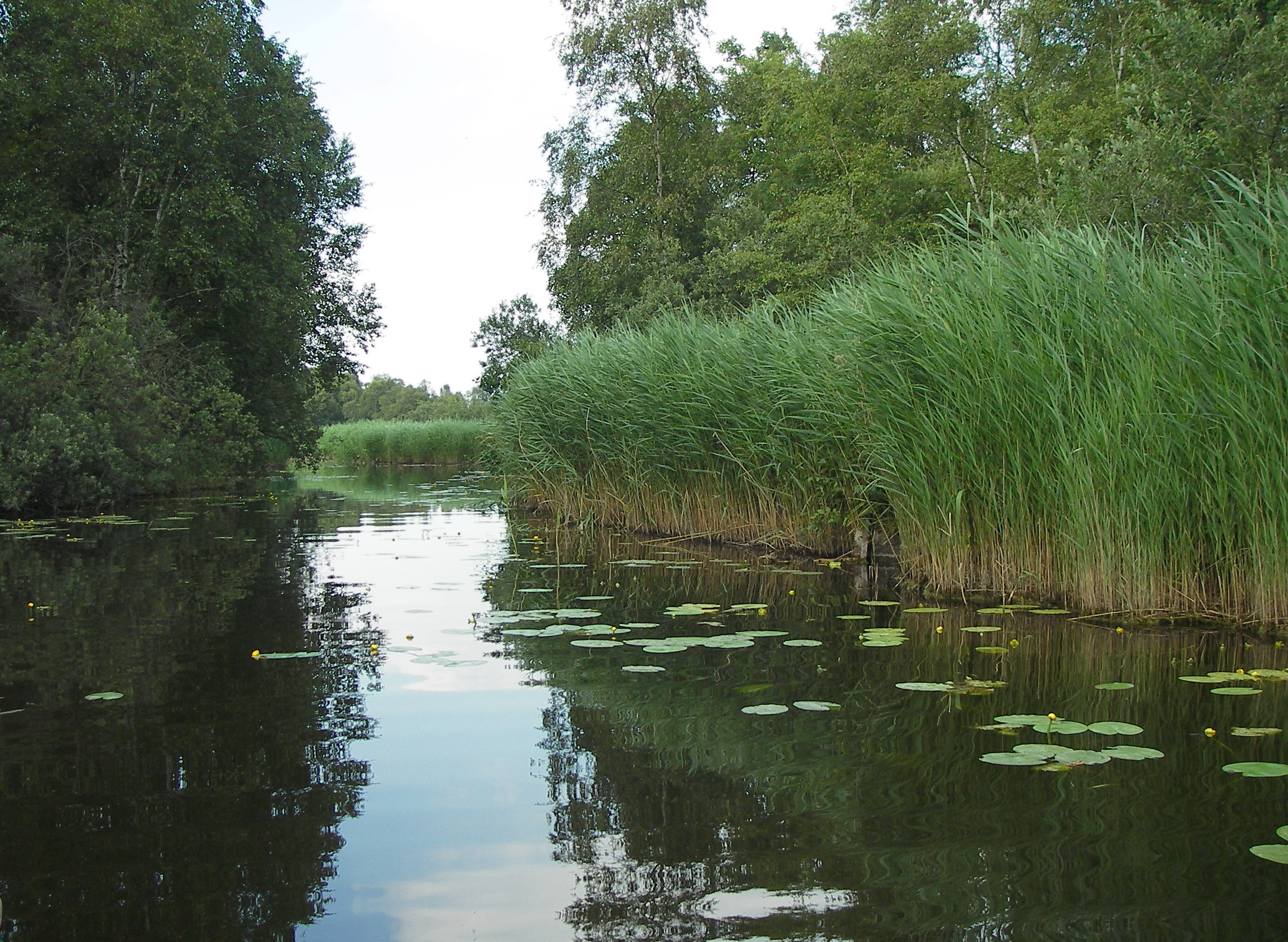 Laagveengebied de Botshol